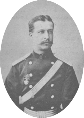 Владимир Михайлович Вонлярлярский, отставной офицер Кавалергардского полка, помещик Новгородской губернии.